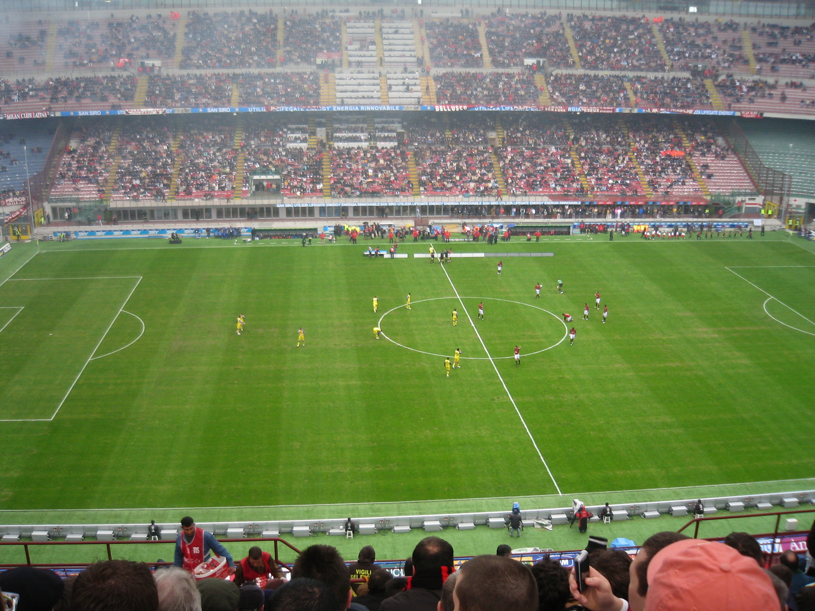 Milan - Chievo, kwiecień 2006Milan - Chievo, april 2006